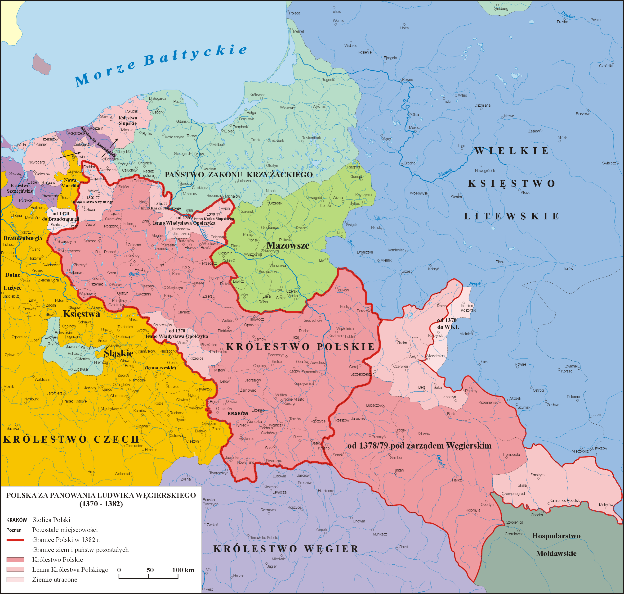 Mapa Polski za panowania Ludwika Węgierskiego (1370 - 1382)